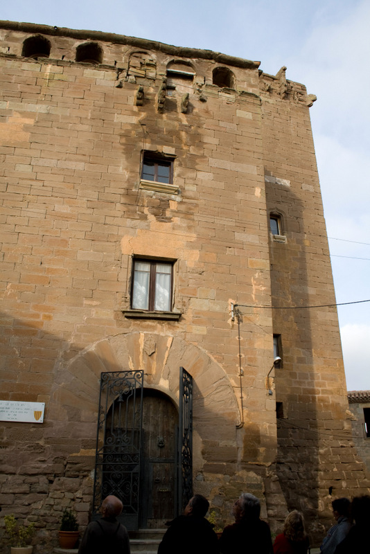 castell d'Aranyó a la Segarra-Catalunya